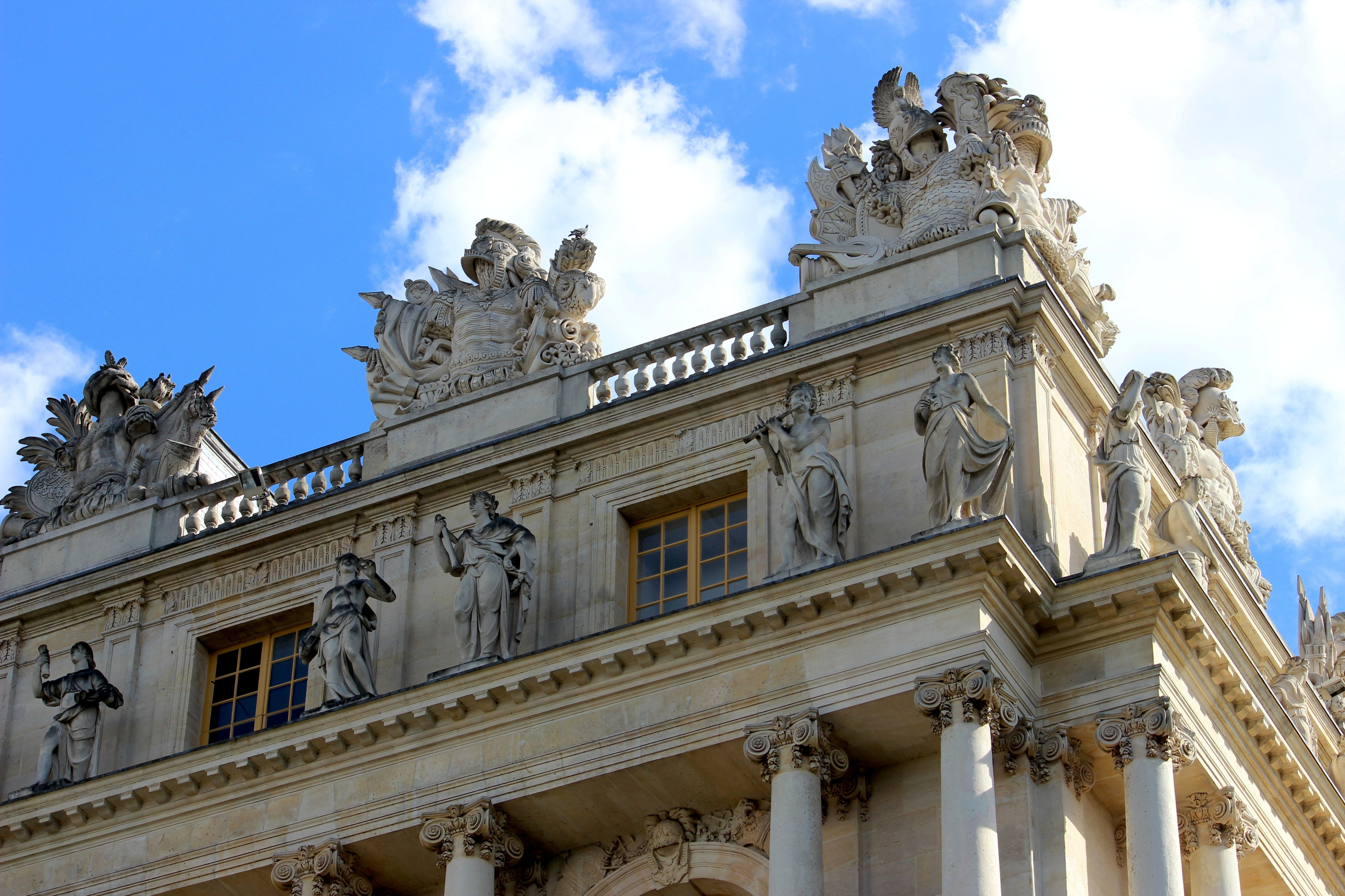 Château de Versailles, Façade aux jardins. .